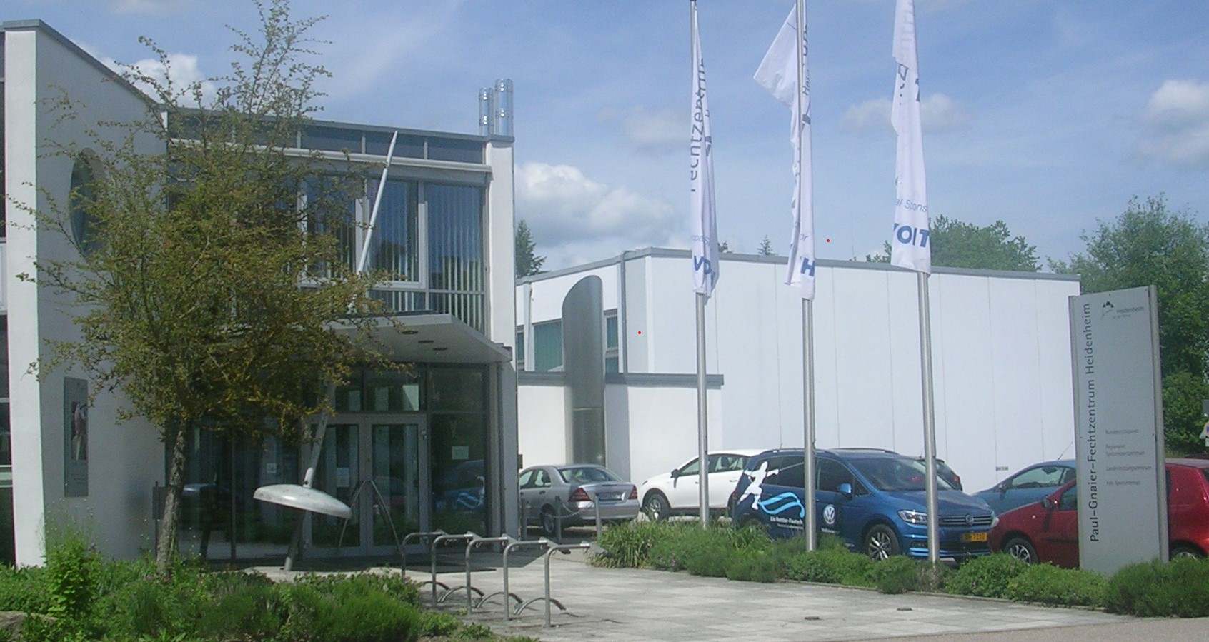 Landesleistungszentrum (1970), Bundesstützpunkt Fechten neben Bonn und Tauberbischofsheim (1979) sowie Sport-Teilinternat Modell Heidenheim (1979) in Kooperation mit dem Max-Planck-Gymnasium